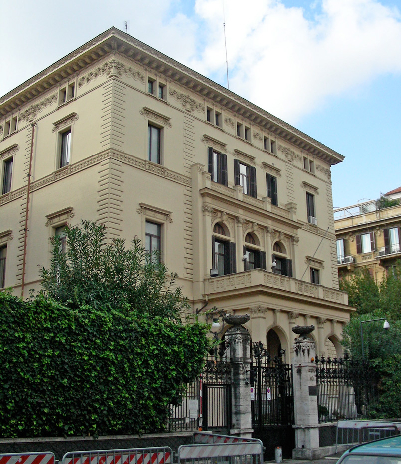 Roma, villino Rudinì (via Quintino Sella, 60)